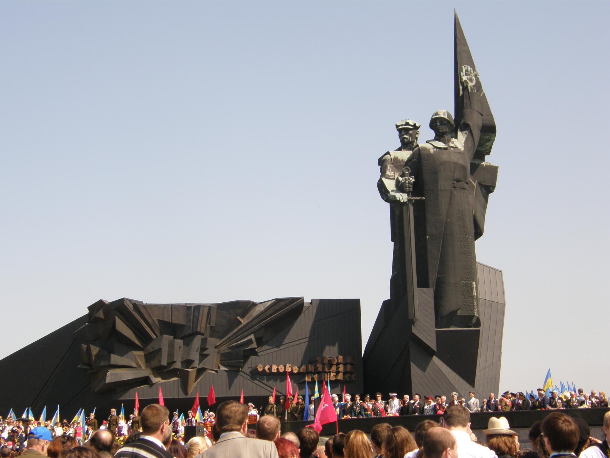 Донецк. Парк Ленинского комсомола. Празднование Дня Победы.